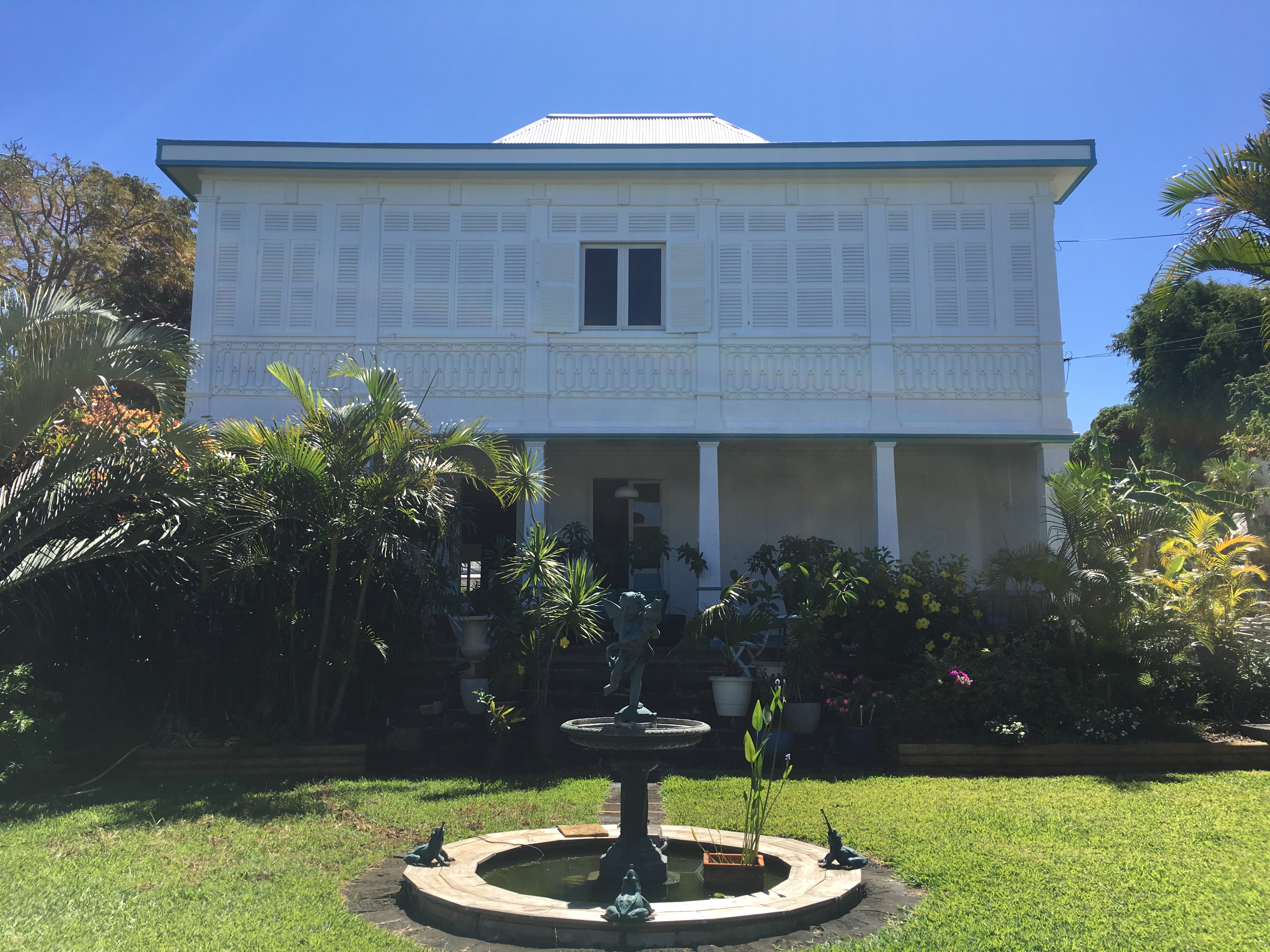 Maison Levesque façade principale